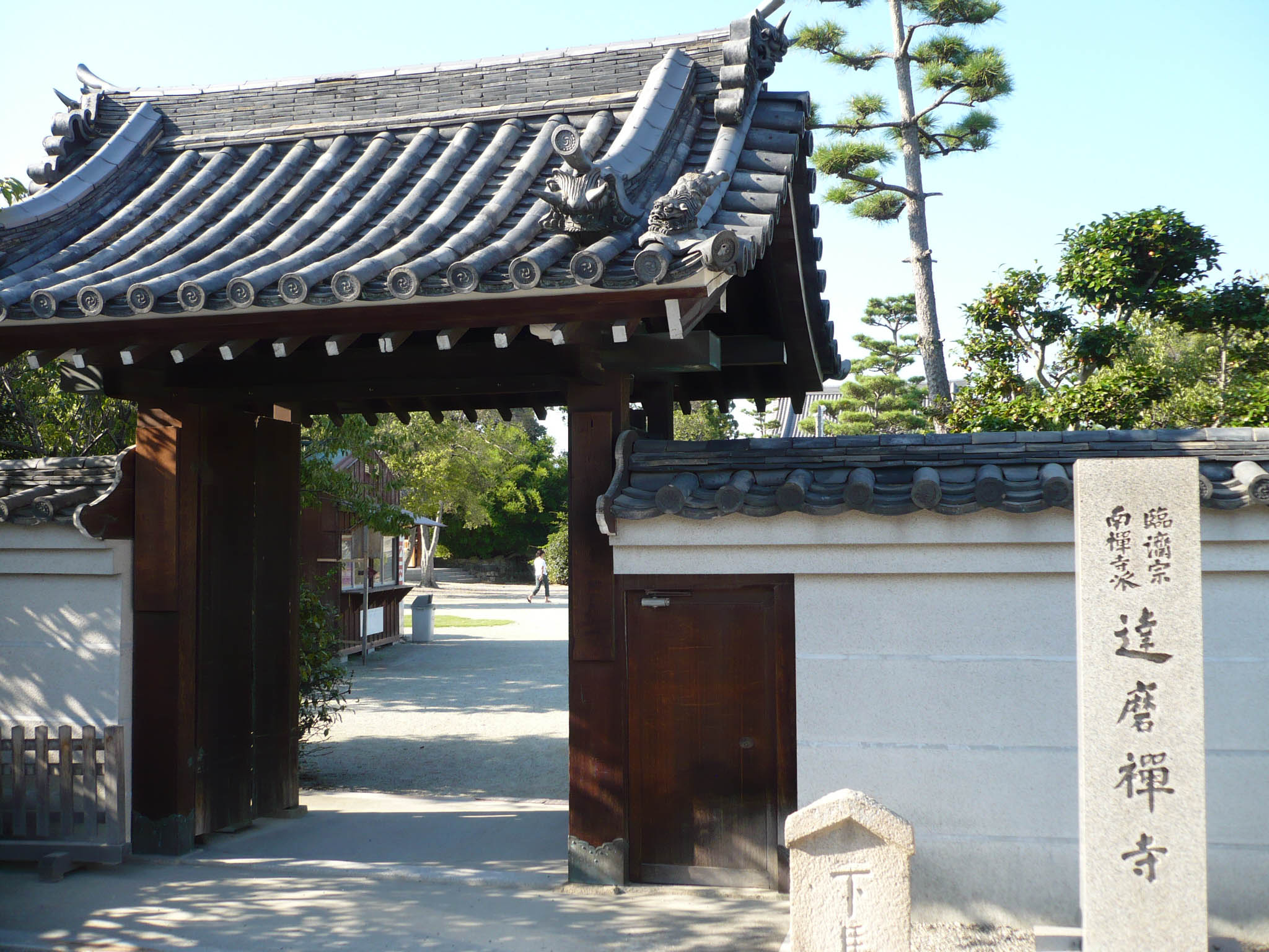 山門